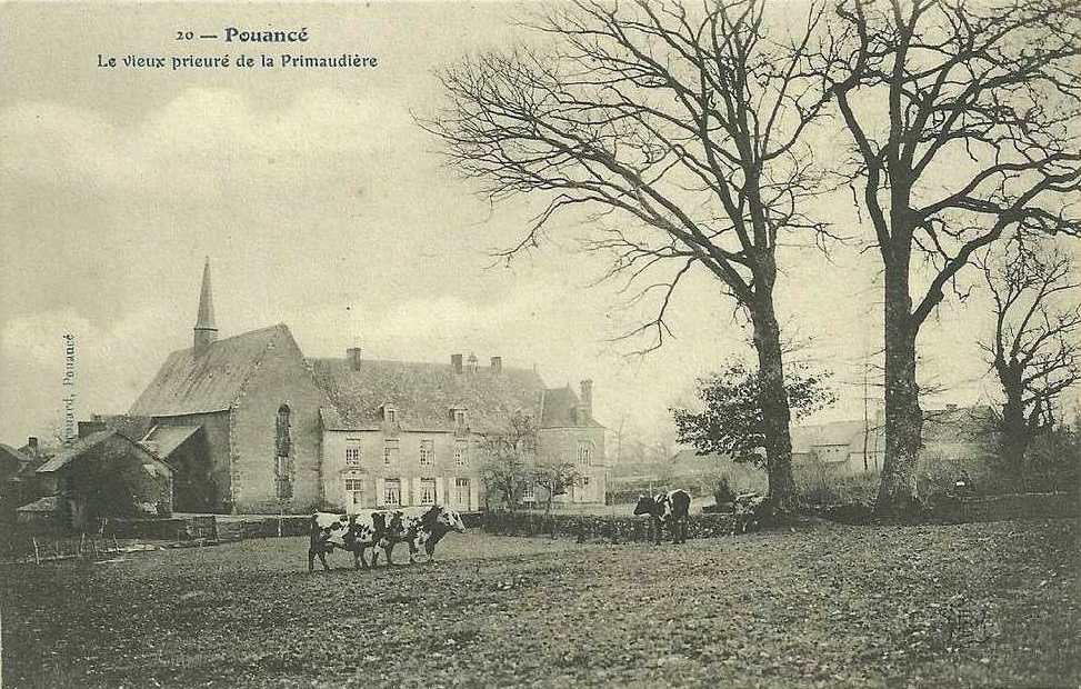 Vue du Prieuré de la Primaudière dans les années 1900.